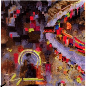 Franz Beda Riklin Rheinau 1920 Pastell im Besitz der Familie